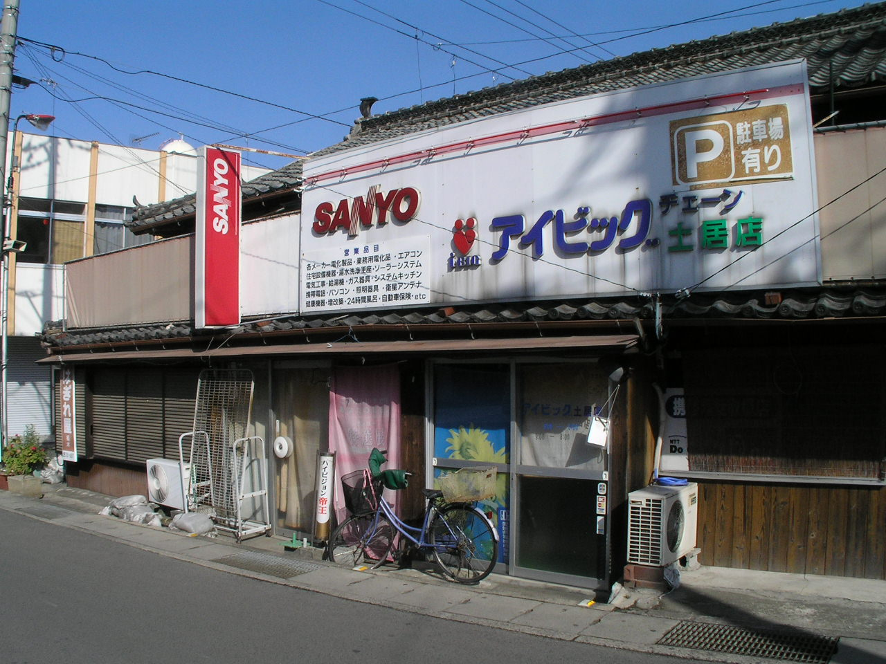 土居商店街